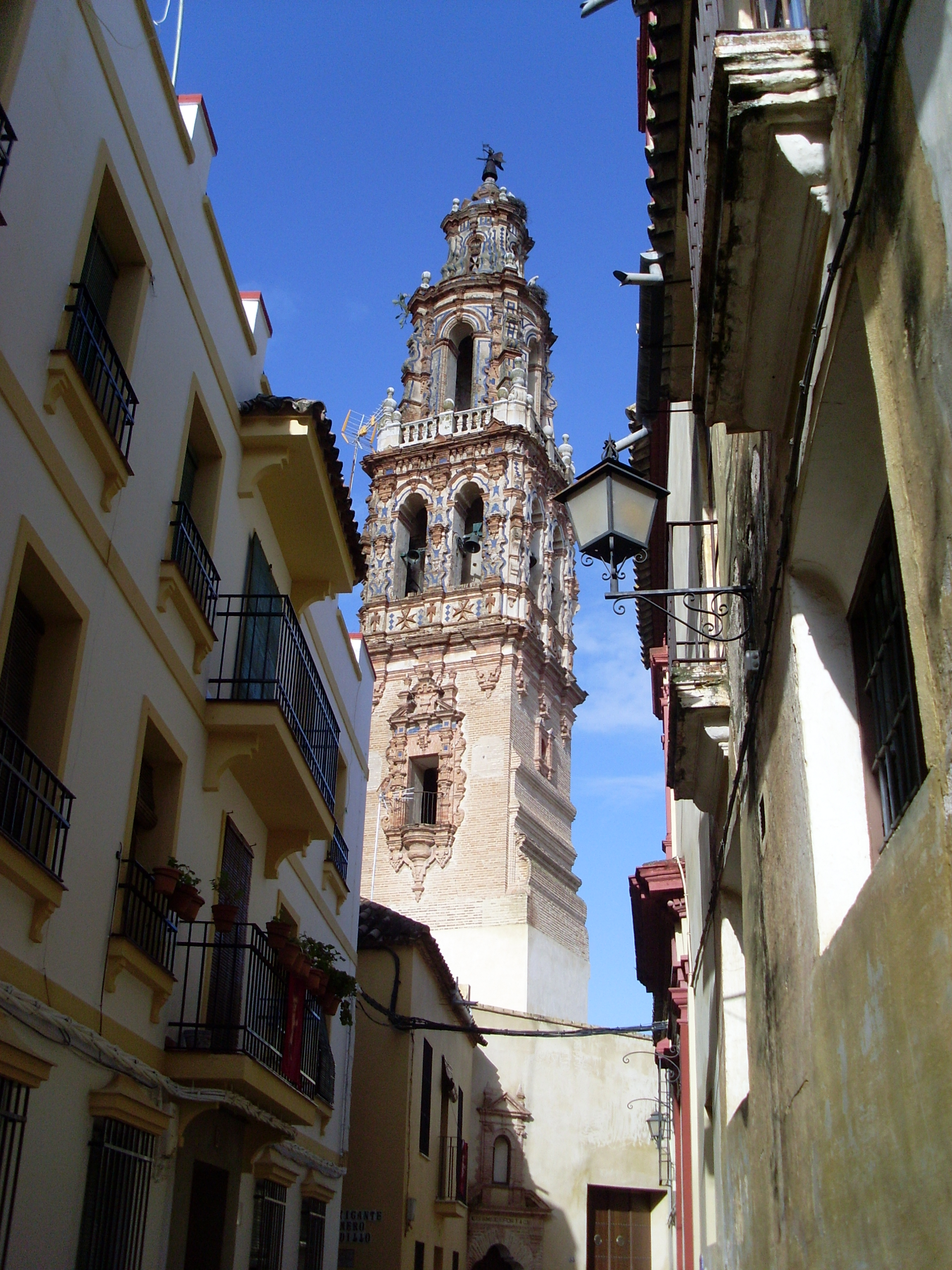 Torre de la Iglesia de San Juan.